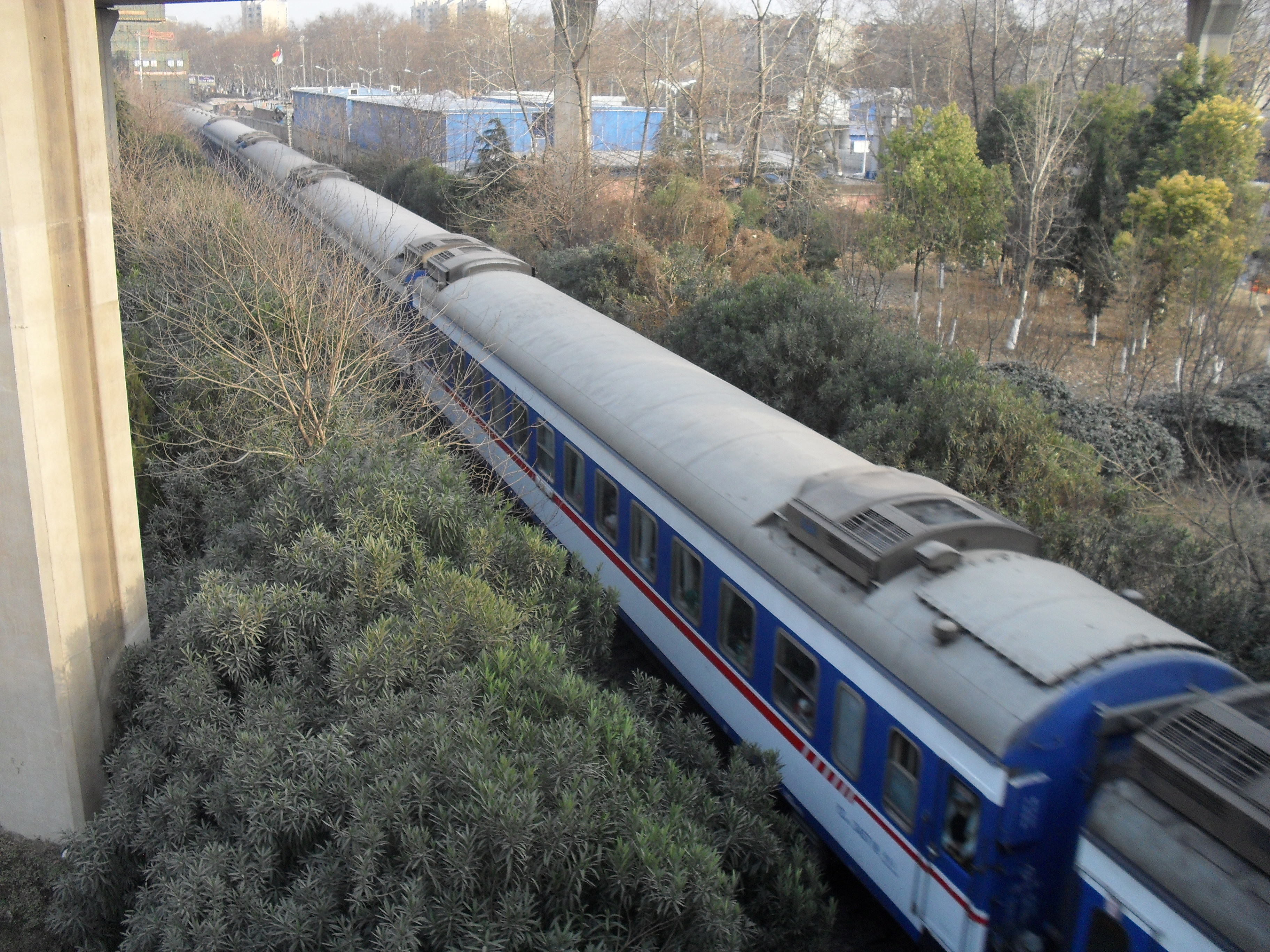 南京双桥门立交桥